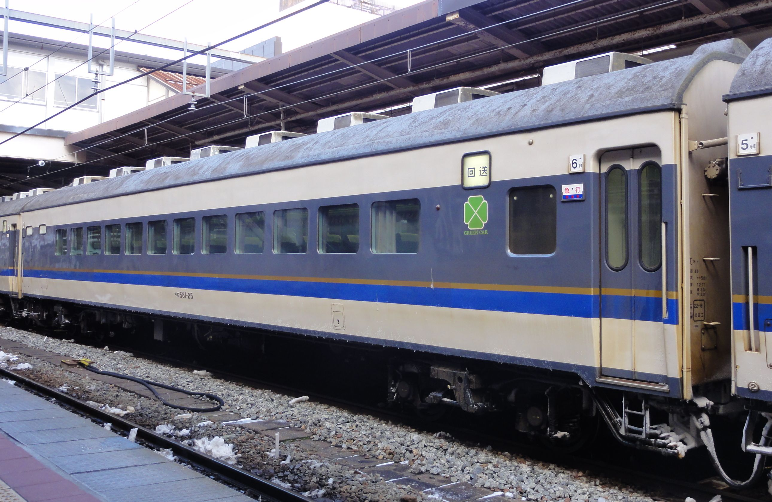 581系電車 サロ581-25